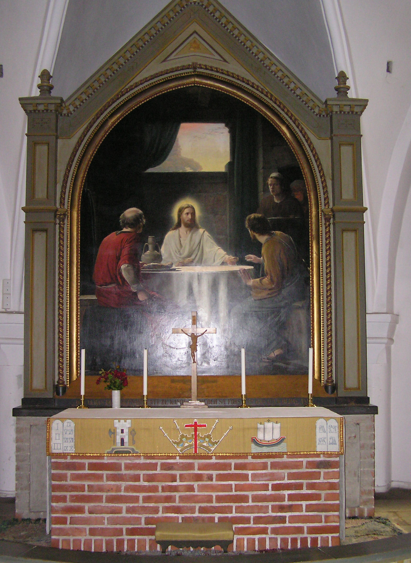 Løderup kirke i Skåne, altertavle. Kristus i Emmaus af Carl Bloch